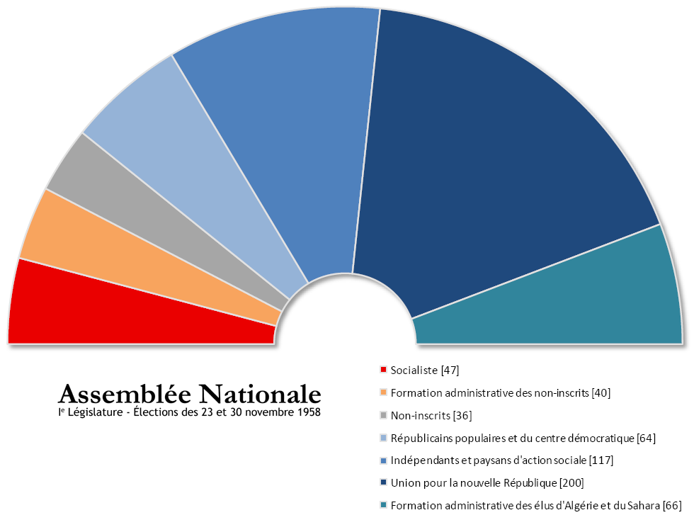 Assemblée Nationale française issue des élections de novembre 1958 (le groupe socialiste est représenté en rouge en référence aux couleurs abordées par la SFIO, plus tard fondu dans la FGDS et ensuite dissoute dans le PS)